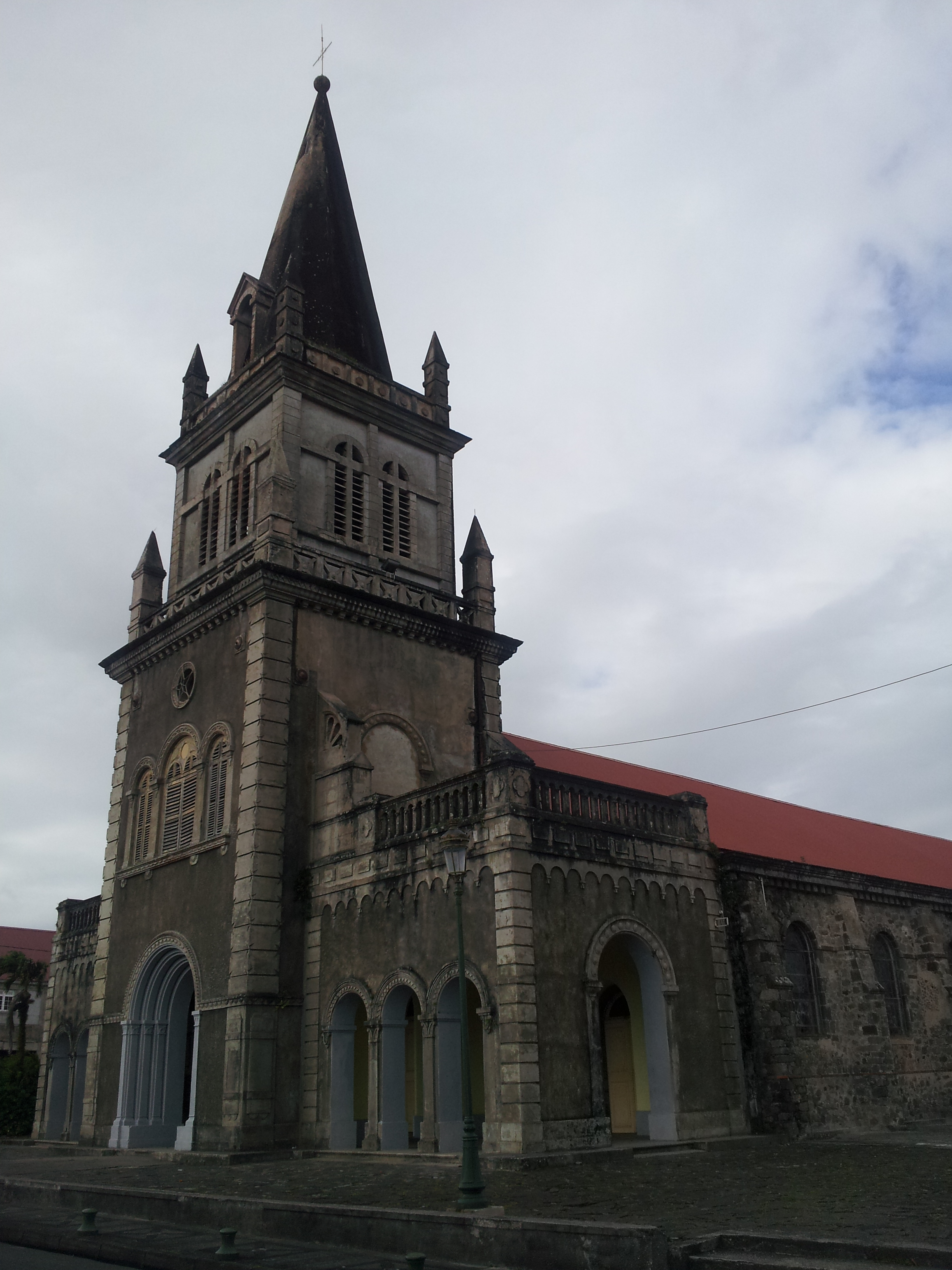 Façade de l'église Notre-Dame de la Délivrande du Morne-Rouge